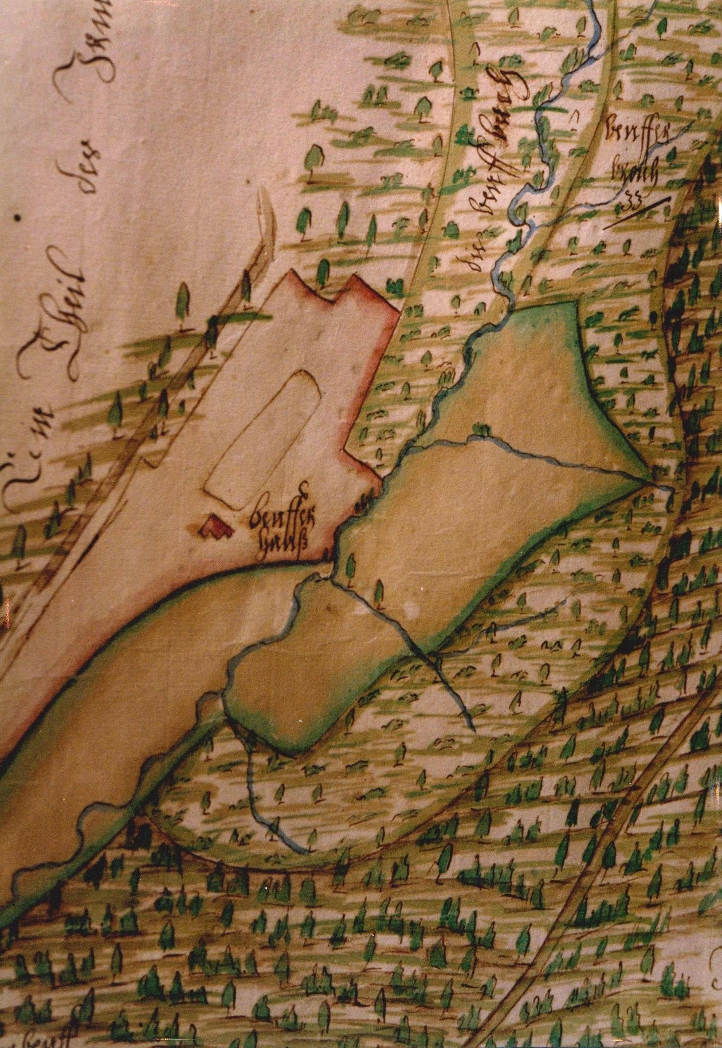 Aufnahme aus dem Forstatlas der Grafschaft Wittgenstein von 1739. Die Karte zeigt das erste Haus in Benfe, erbaut um 1713. Der Forstatlas befindet sich im Fürst Wittgenstein´schen Archiv in Bad Laasphe